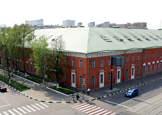 Лефортовские казармы. Вид на военный городок «Лефортово» с Красноказарменной улицы